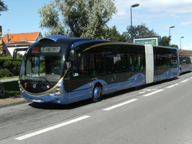 Photo d'un bus DK'BUS Marine sur la ligne 2 à Dunkerque